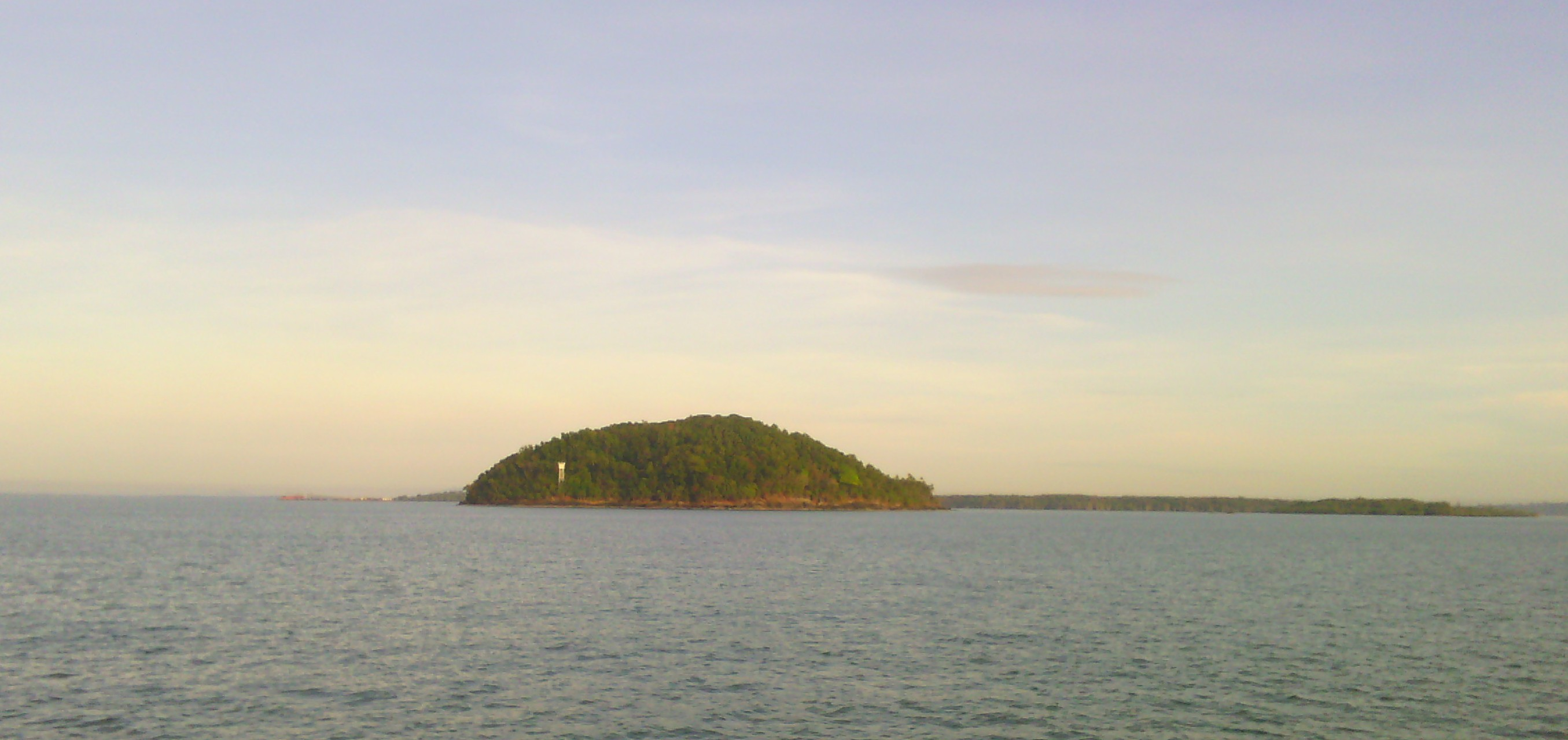 Pulau Aur (Kalimantan Selatan) adalah pulau yang terletak di selat makassar, 1 mil laut di selatan pulau Sebuku dan 28 mil laut di selatan Kotabaru, propinsi Kalimantan Selatan.